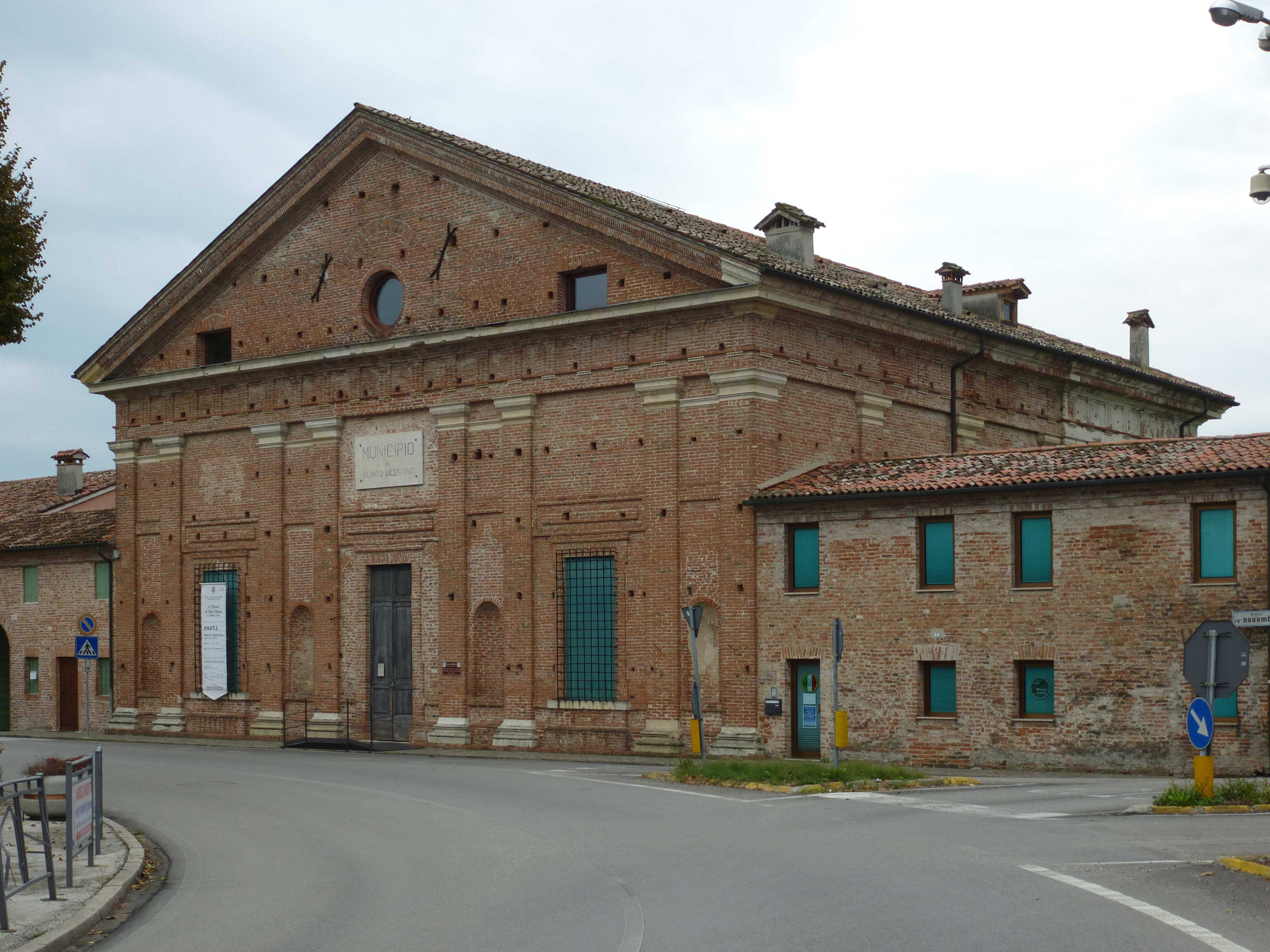 Villa Thiene in Quinto Vicentino, Straßenfront